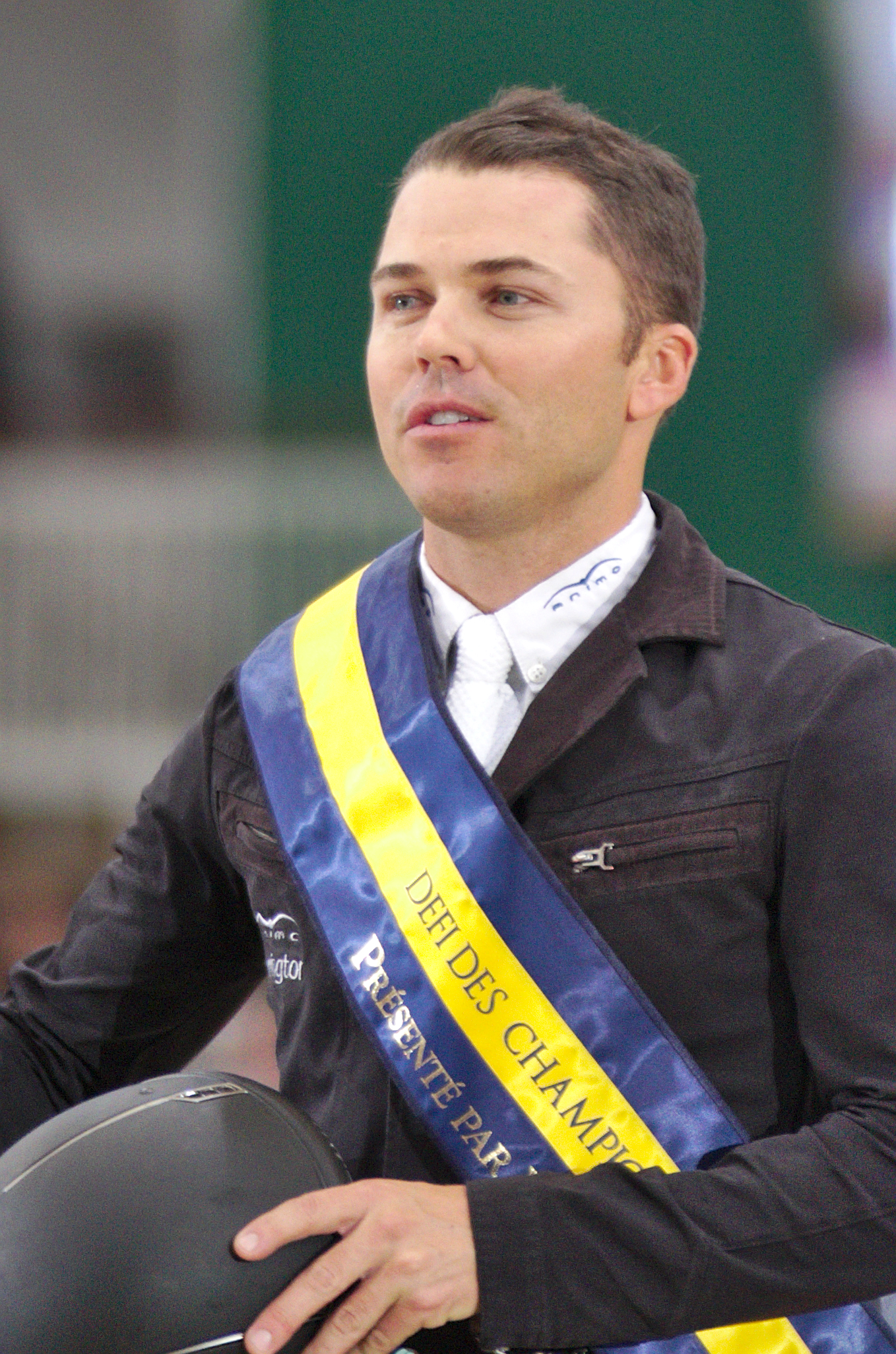 CHI Genève 2013 - 20131214 - Kent Farrington